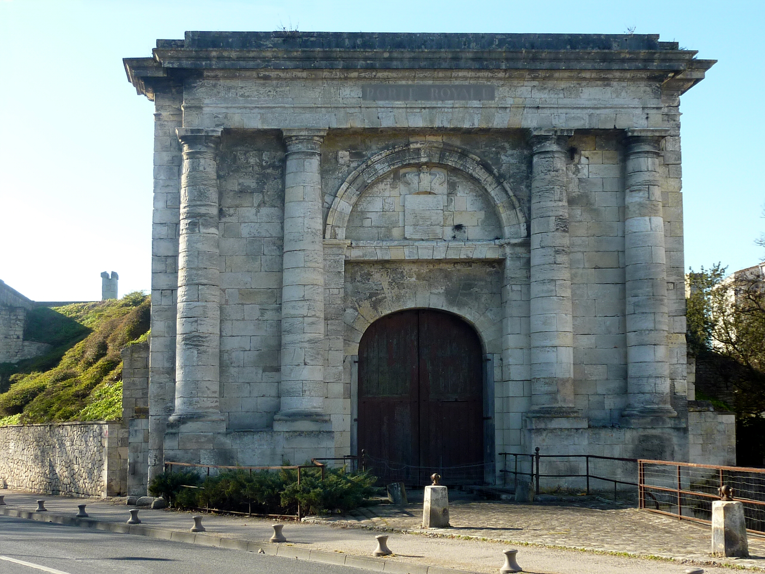 Porte Royale côté extérieur La Rochelle Charente Maritime France